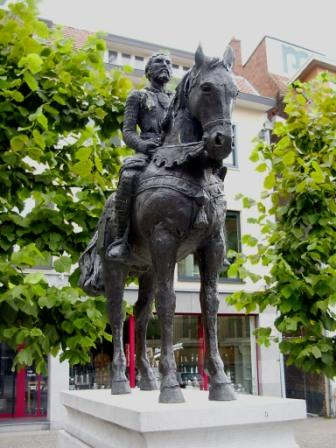 Arnold IV van Loon te Hasselt